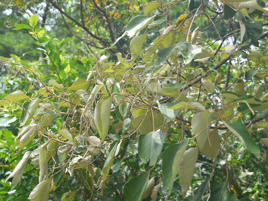 Mallotus paniculatus：ウラジロアカメガシワ 2009/08/11 石垣島バンナ岳：Ishigaki Island, Okinawa pref. Japan